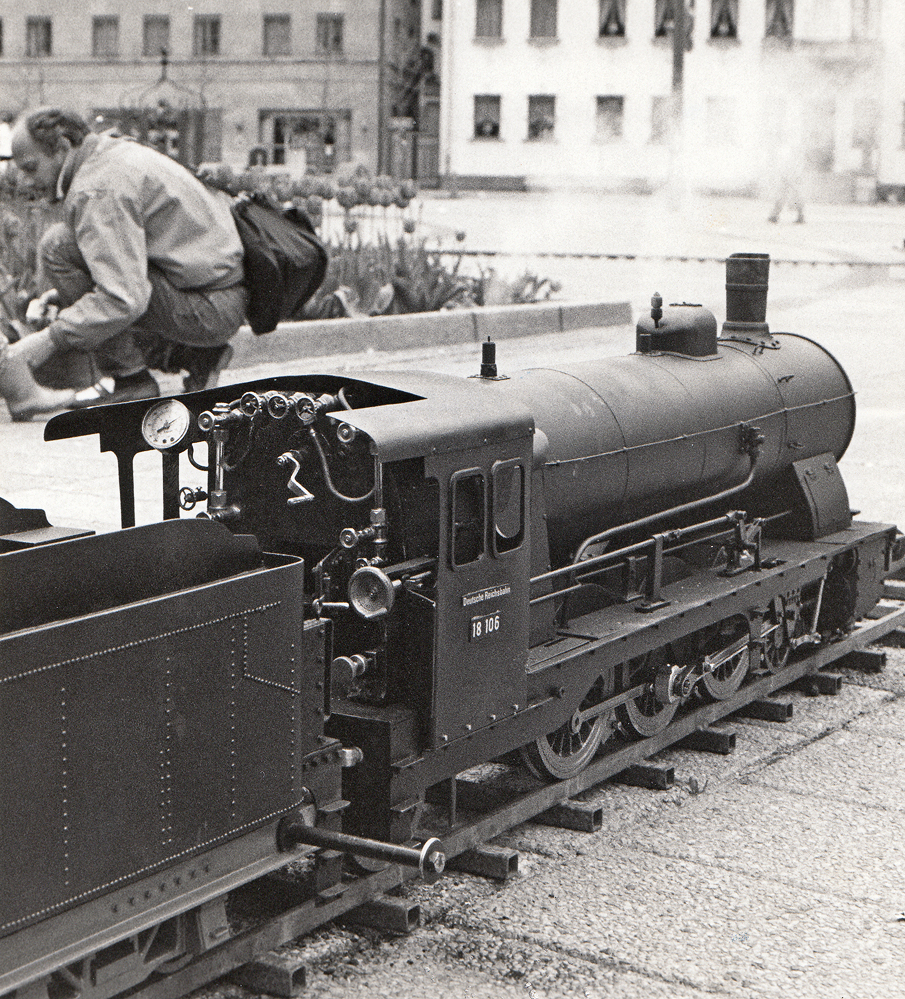 Modelljärnväg på Stortorget i Malmö 1987.